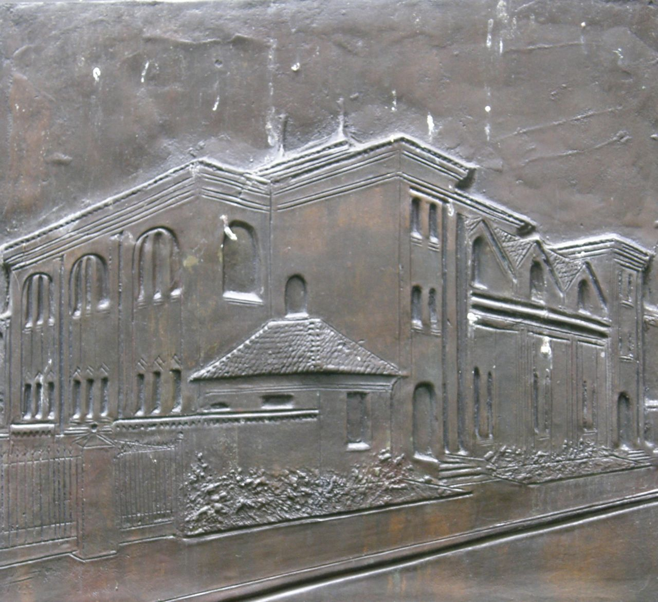 Relief der Synagoge auf der Gedenktafel für die Synagoge "Friedenstempel" Halensee. Markgraf-Albrecht-Straße 11-12, Berlin-Halensee. Entüllt am 9. November 1988.